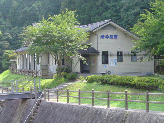 畑の冷泉（元々は湧水にそのまま浸かる施設で、その後サウナ併設となっている。）